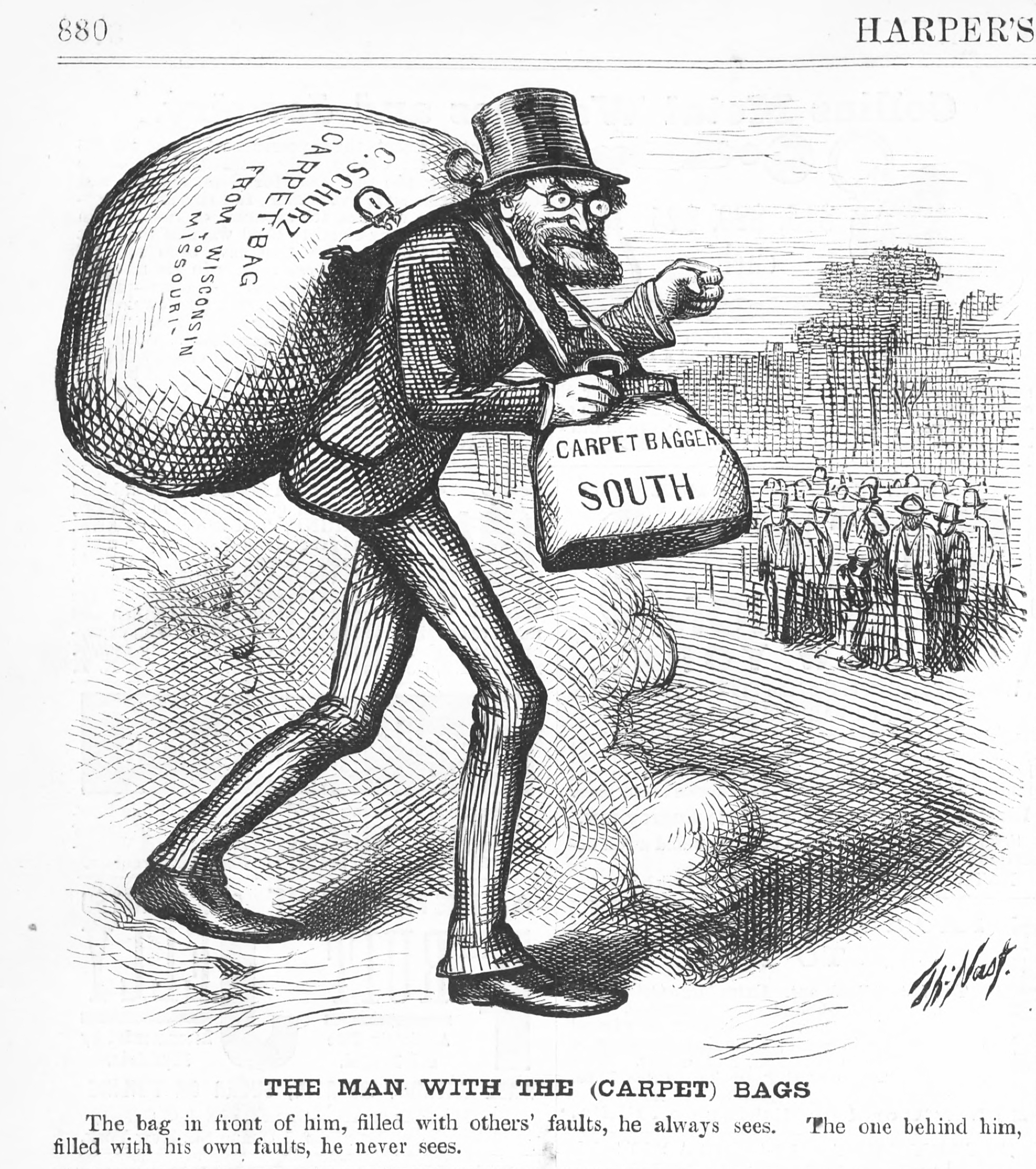 Harper's Weekly cartoon depiction of Carpetbagger used in article Carpetbagger - (kẻ gói thảm hoặc kẻ ôm túi từ Bắc vào Nam Hoa Kỳ)